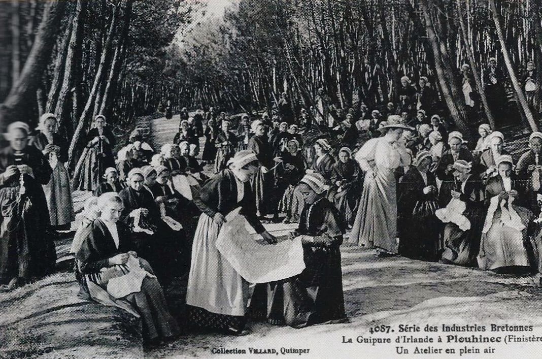 Madame de Lécluse animant un atelier en plein air de guipure d'Irlande dans le parc du château de Locquéran en Plouhinec (vers 1910, carte postale Villard)